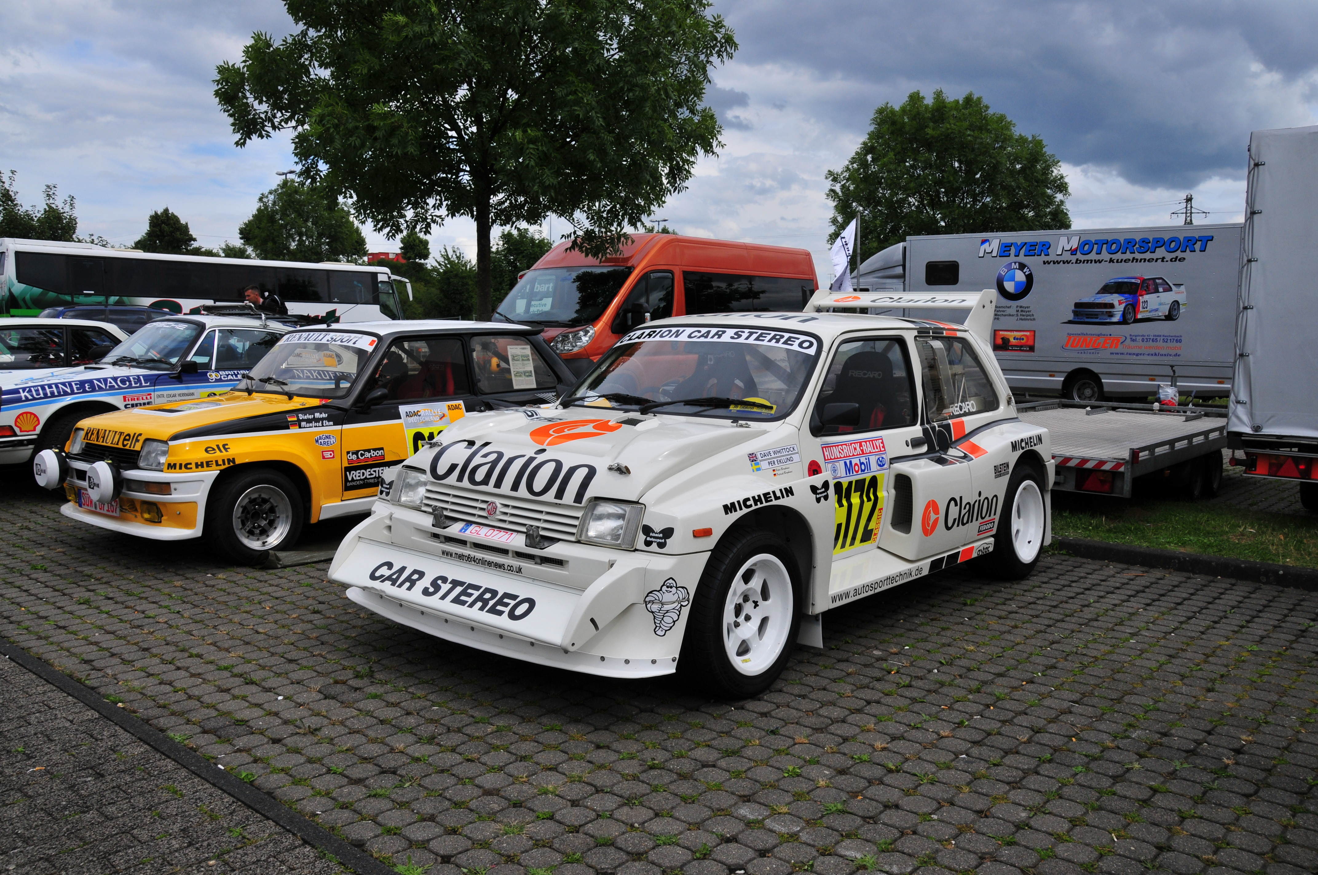 Per Eklund's MG Metro 6R4 at the 2008 Rallye Deutschland.